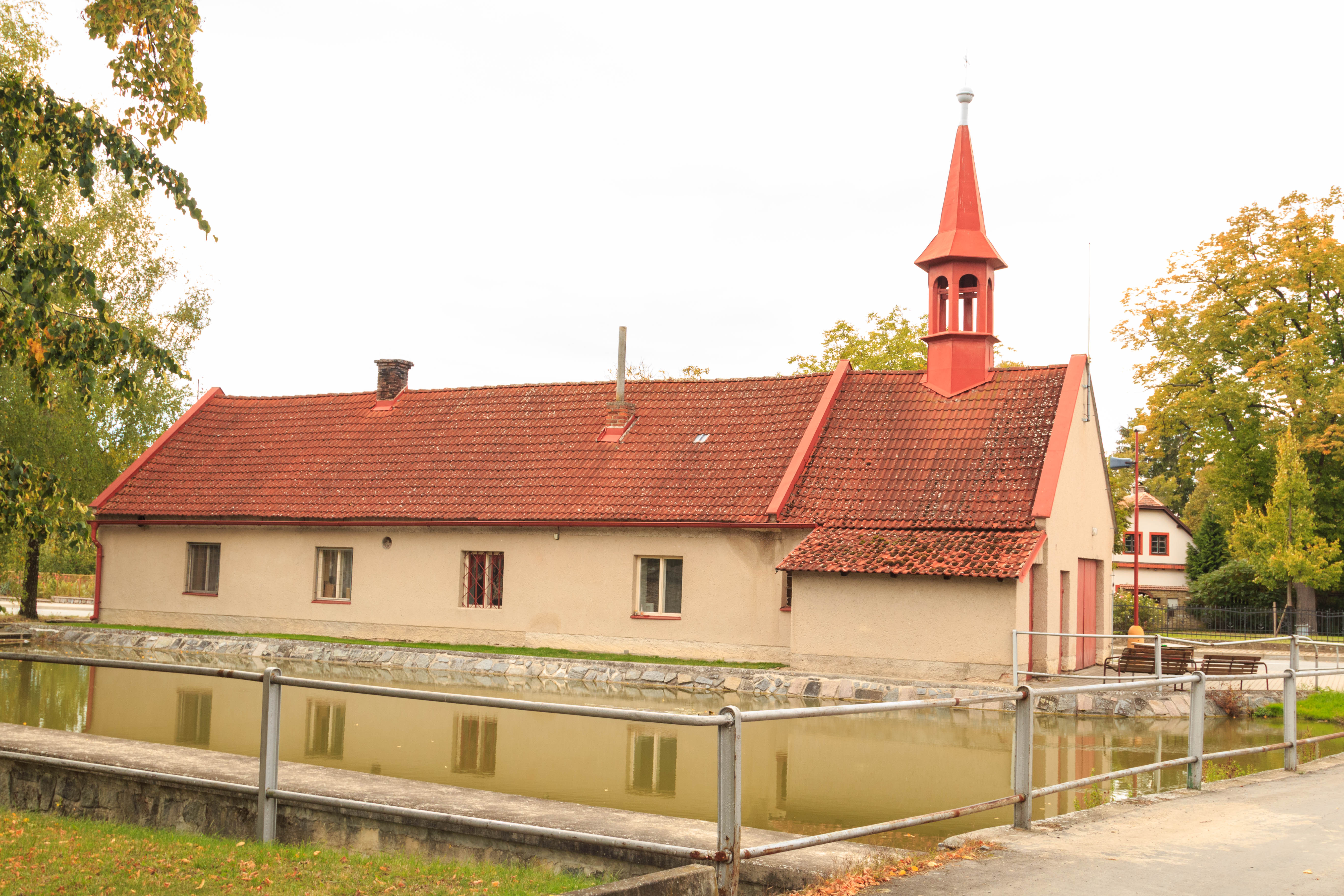 Štenec požární nádrž